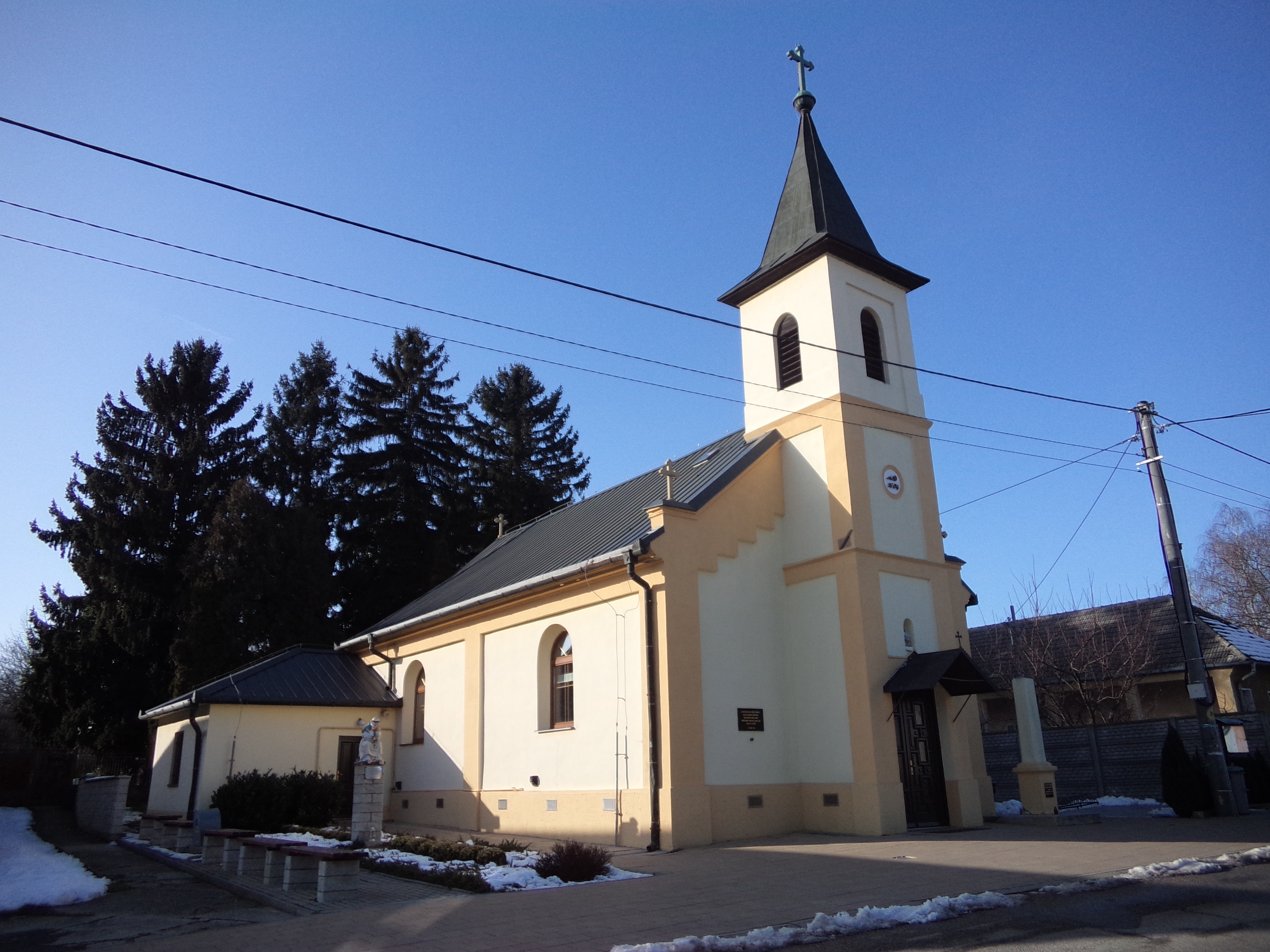 Bellegszencse